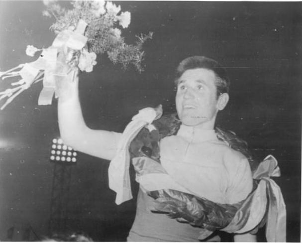 Gazda Zentralbild Wendorf 8.5.1960 Telebild - XIII. Friedensfahrt 1960 - 5. Etappe. UBz: Etappensieger Gazda (Volkspolen) auf dem Siegerpodest.